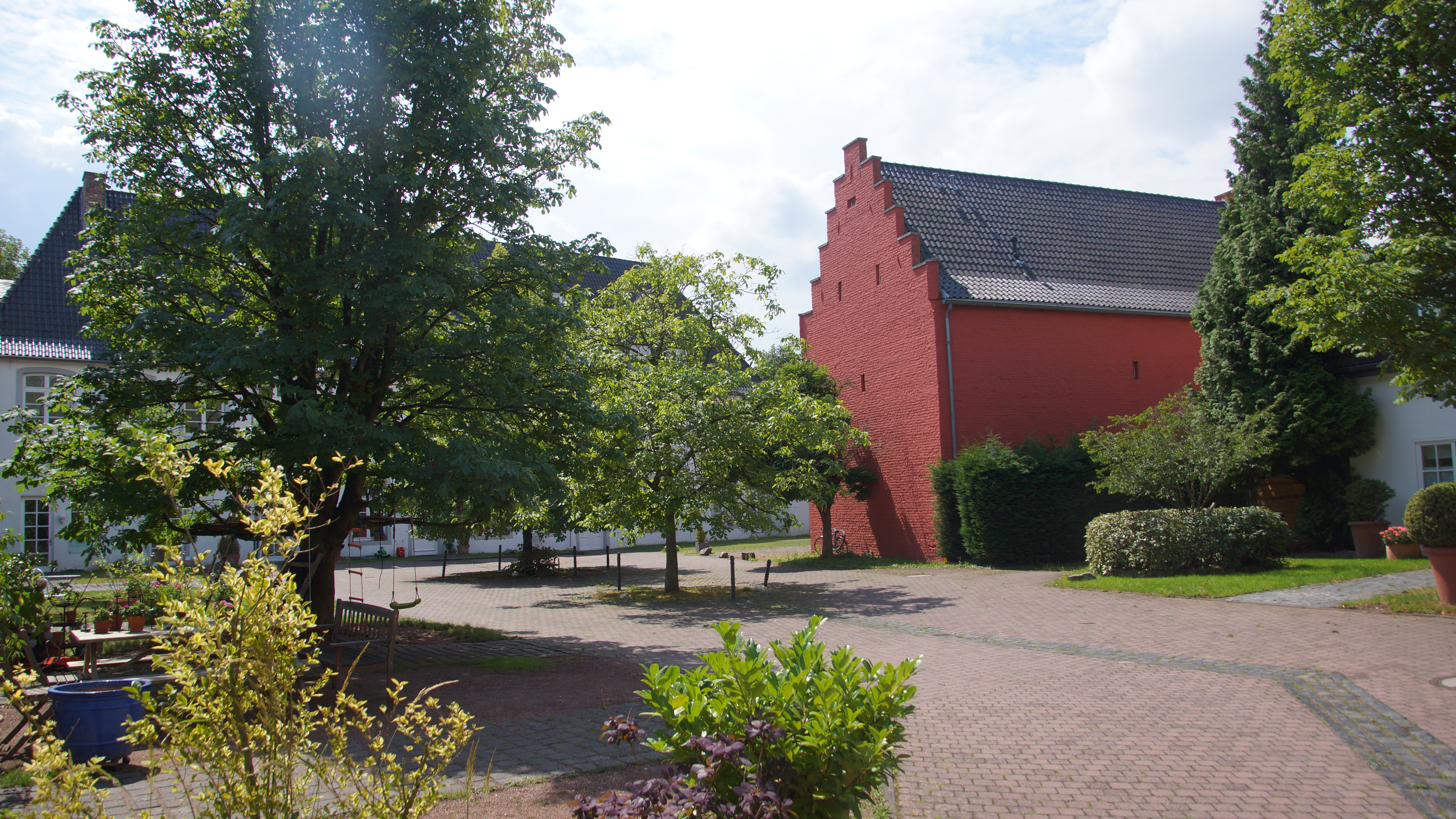 Klosterhof mit dem gotischen Stufengiebelhaus des ehemaligen Klosters Königsdorf in Frechen-Königsdorf, Sebastianusstr./Aachener Str. This is a photograph of an architectural monument. 13